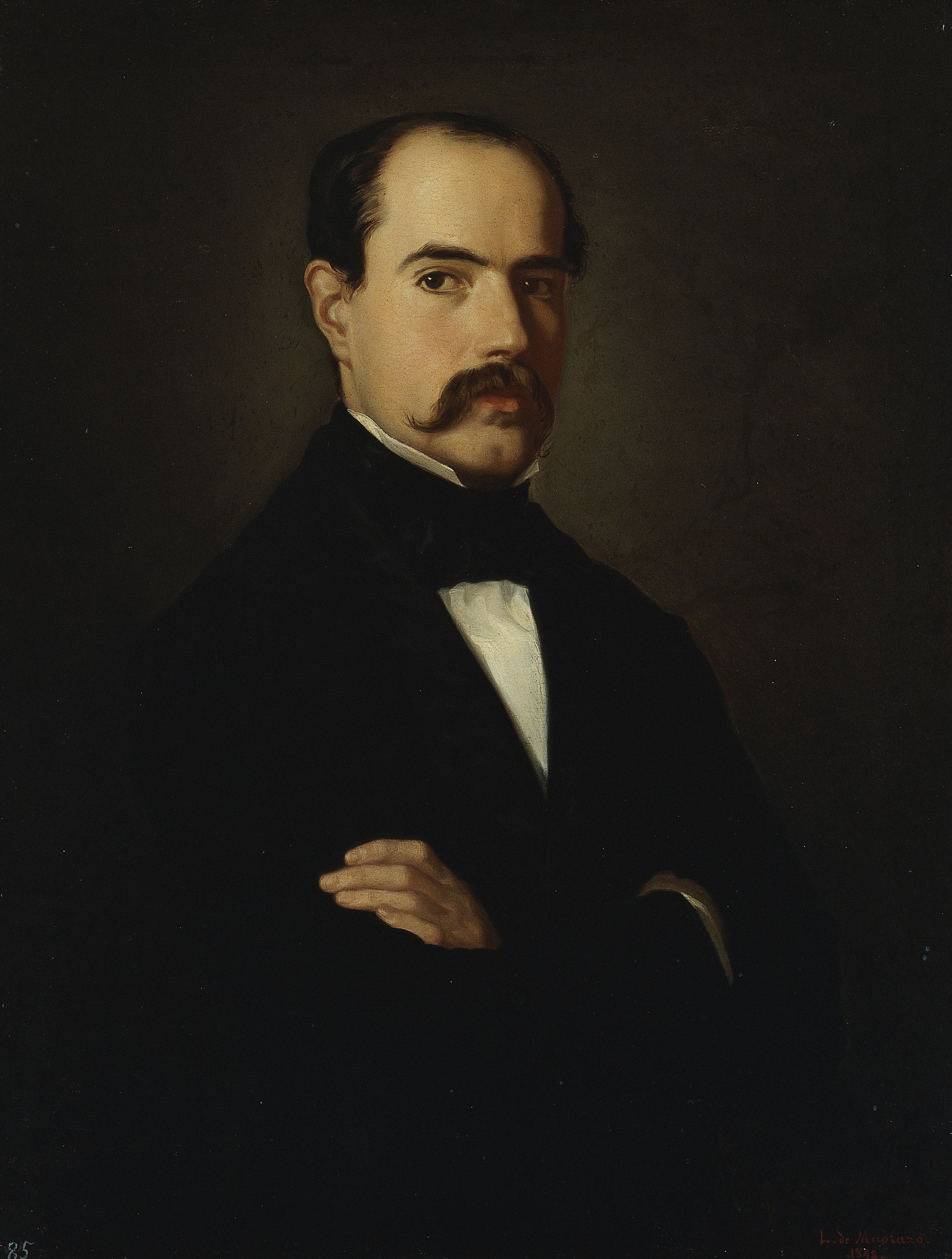 Retrato del pintor español Francisco Sáinz y Pinto (1823-1853), por Luis de Madrazo.